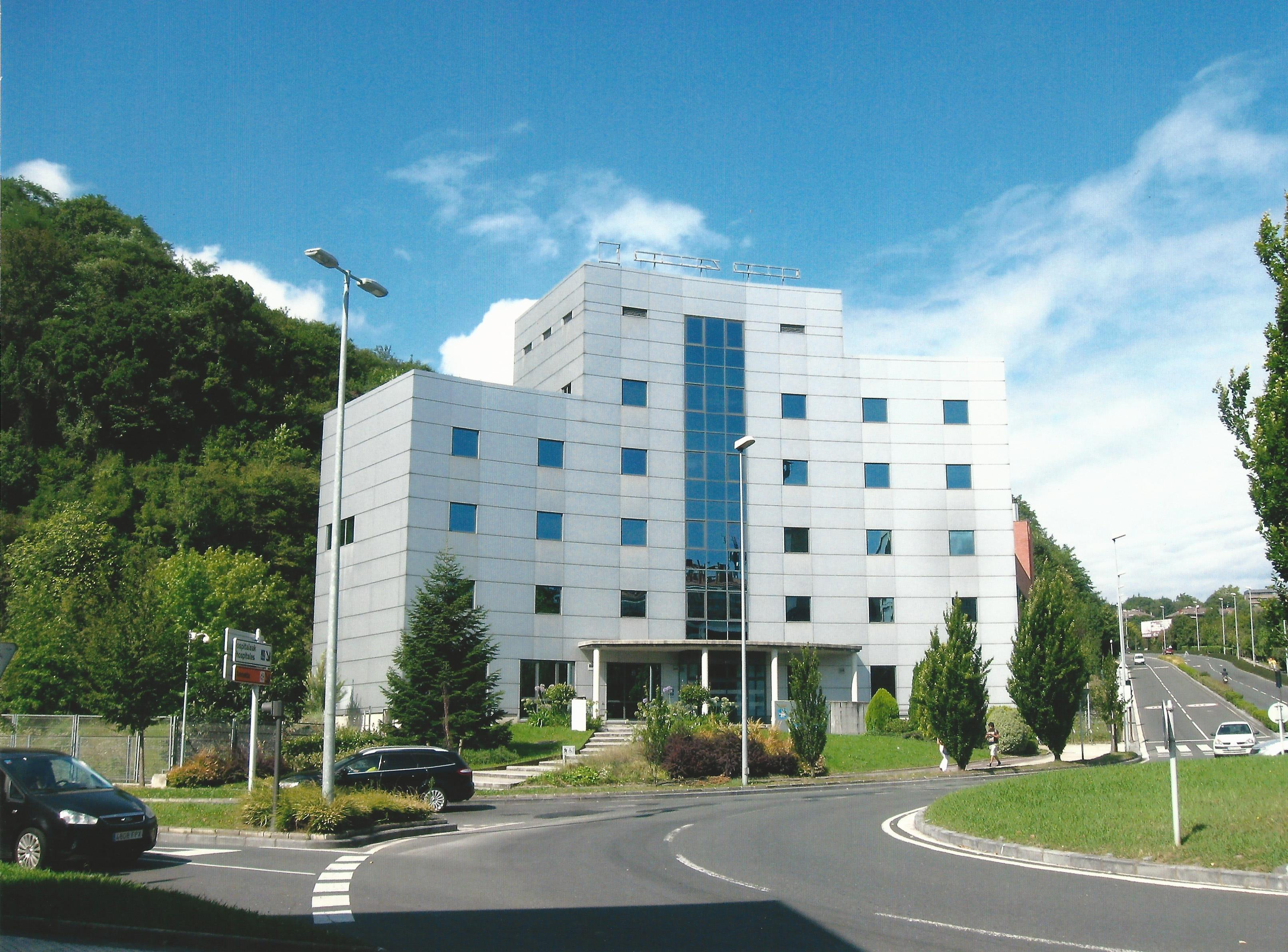 2015 Colección Amarauna Bilduma. -- Argazkilaria / Fotógrafo: Antonio Alonso Perez -- Informazio gehiago Amarako Ernest Lluch Kultur Etxeko Liburutegia / Más información: Biblioteca del Centro Cultural Ernest Lluch de Amara (Donostia / San Sebastián).-- R. zkia. 1125 Ernest Lluch kultur etxea Native nameErnest Lluch kultur etxeaLocationSan Sebastián (Basque Country, Spain)Coordinates43° 18′ 07.13″ N, 1° 58′ 20.33″ W Established2001Web page control : Q19793929 VIAF: 123581875 institution QS:P195,Q19793929